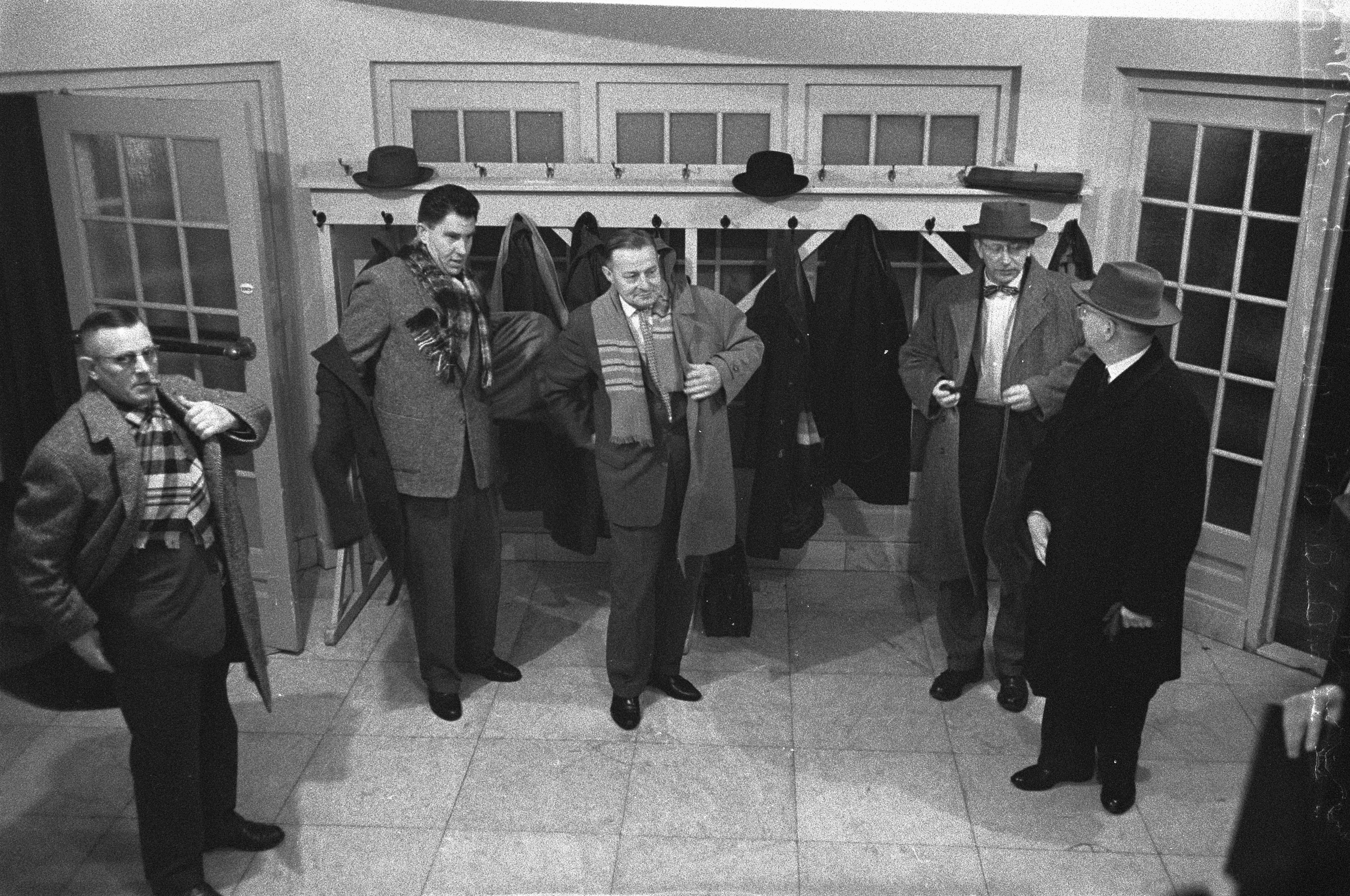 Collectie / Archief : Fotocollectie Anefo Reportage / Serie : [ onbekend ] Beschrijving : Bespreking tussen Vakraad van de Metaal en de regering Den Haag , leden van de vakraad gaan naar huis Datum : 6 december 1960 Locatie : Den Haag, Zuid-Holland Trefwoorden : besprekingen, leden, regeringen Persoonsnaam : Vakraad van de Metaal Fotograaf : Pot, Harry / Anefo Auteursrechthebbende : Nationaal Archief Materiaalsoort : Negatief (zwart/wit) Nummer archiefinventaris : bekijk toegang 2.24.01.05 Bestanddeelnummer : 911-8506